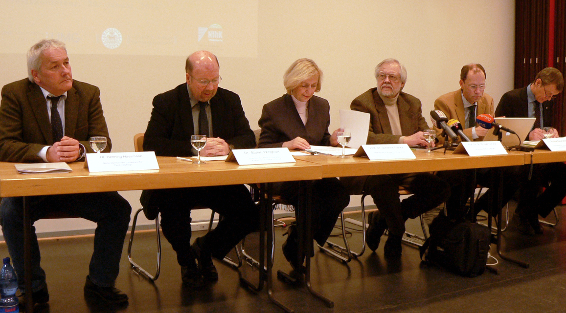 Pressekonferenz im Niedersächsischen Landesamt für Denkmalpflege zum Mädchen aus dem Uchter Moor, von links nach rechts: Henning Haßmann, Stefan Winghart, Johanna Wanka, Michael Schultz, Andreas Bauerochse, Klaus Püschel